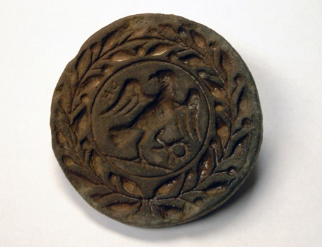 Disco sello de panadero con representación de águila imperial. Benalroma.